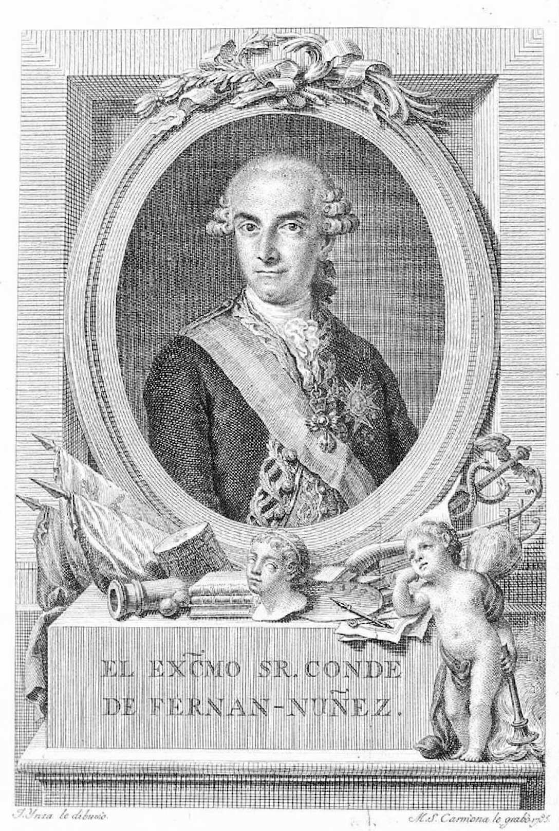 Retrato de Carlos José Gutiérrez de los Ríos y Rohan de Chabot, Ynza le dibuxo, M.S. Carmona le grabó, 1795. Grabado Calcográfico, Biblioteca Nacional de España